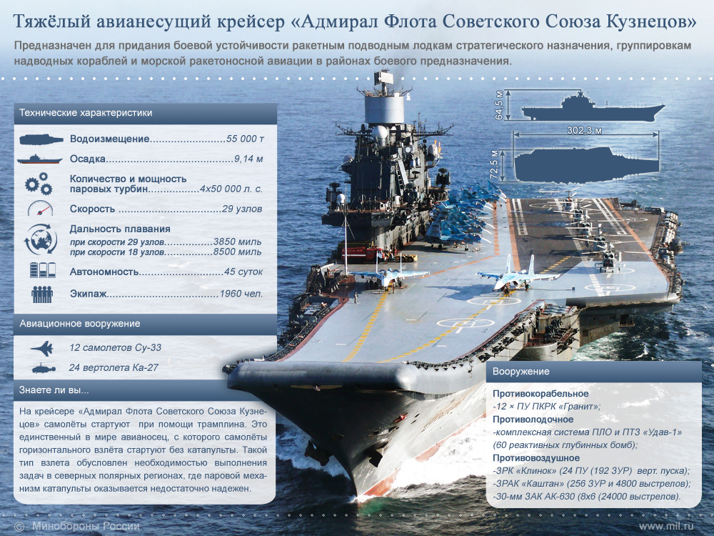 Тяжёлый авианесущий крейсер «Адмирал Флота Советского Союза Кузнецов»